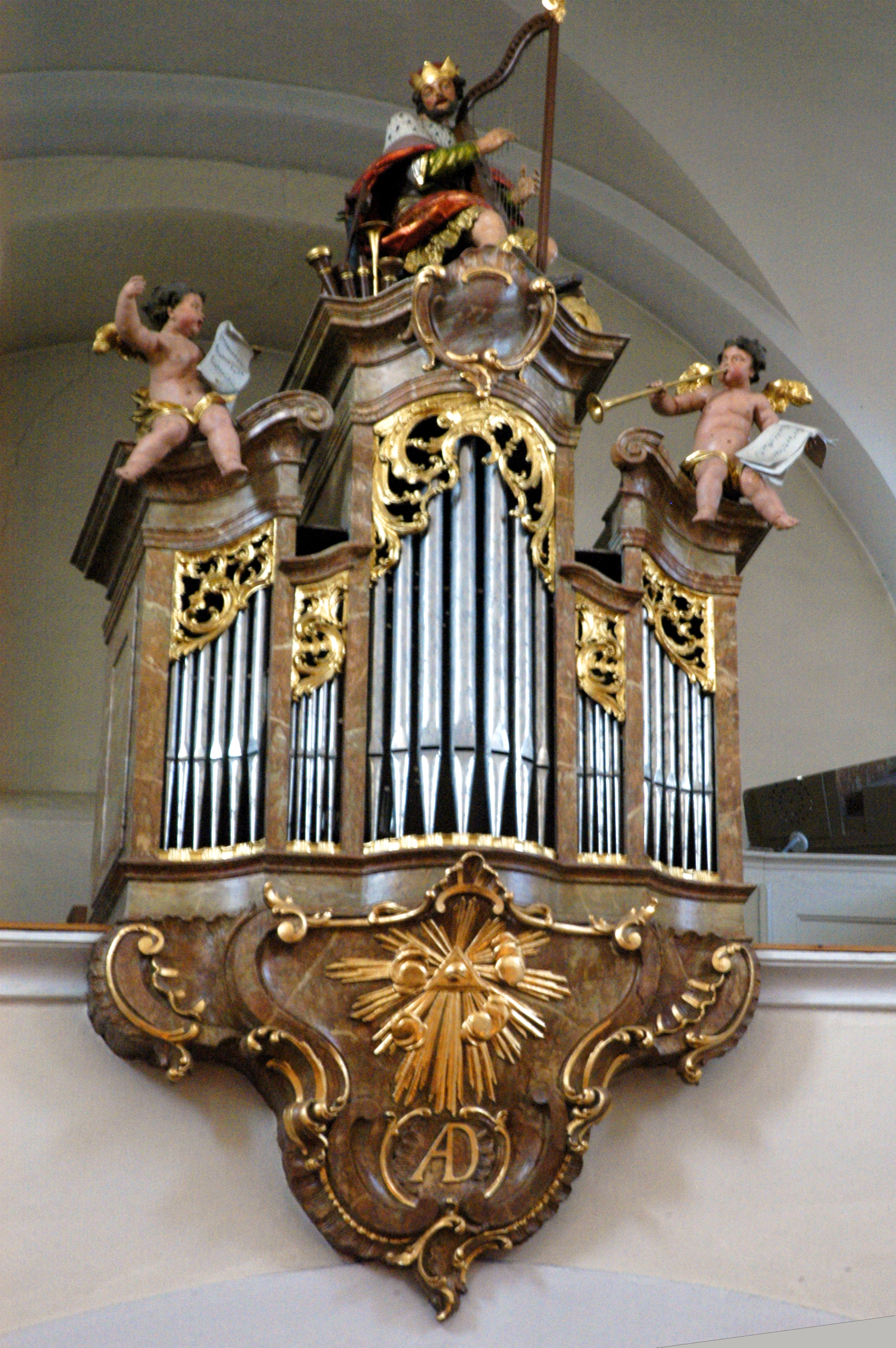 Orgel der katholischen Pfarrkirche heiliger Jakobus der Ältere In Eggendorf am Walde